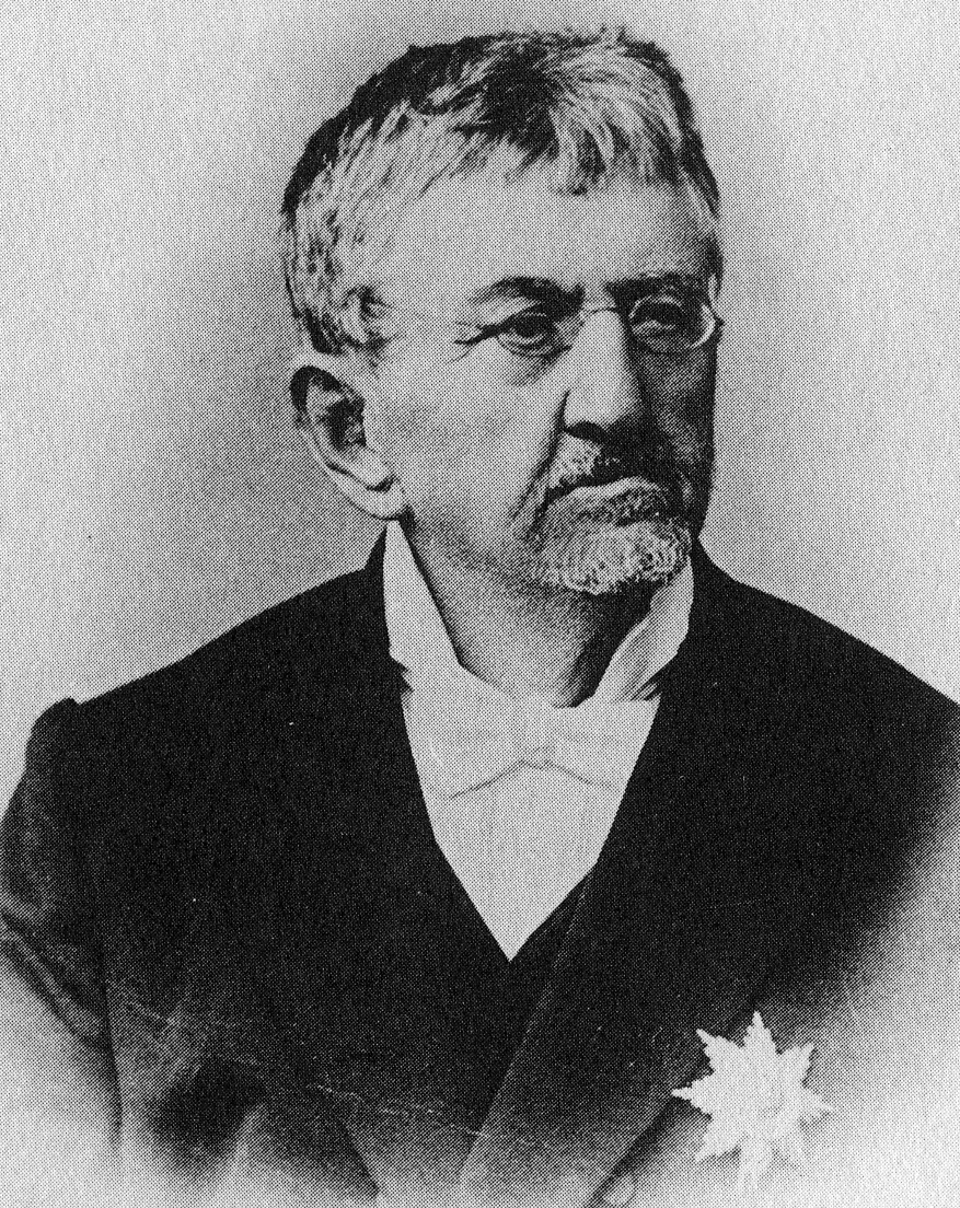 Den Emmanuel Servais porträtéiert vum Charles Bernhoeft.